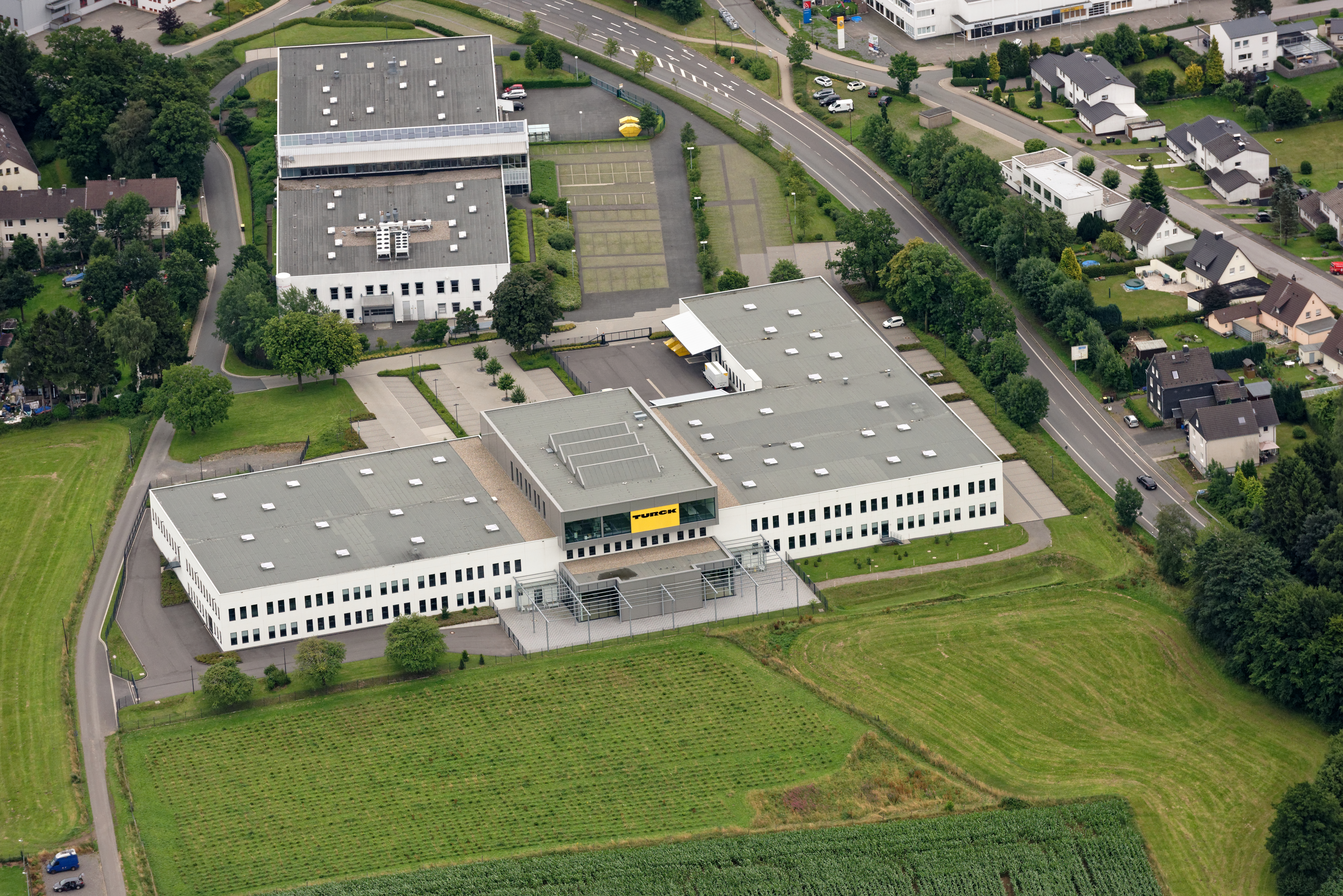 Luftaufnahme: Werner Turck GmbH & Co. KG in Halver und Umgebung, Nordrhein-Westfalen